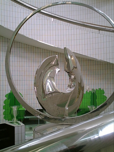 Casa museo Remo Brindisi This is a photo of a monument which is part of cultural heritage of Italy.